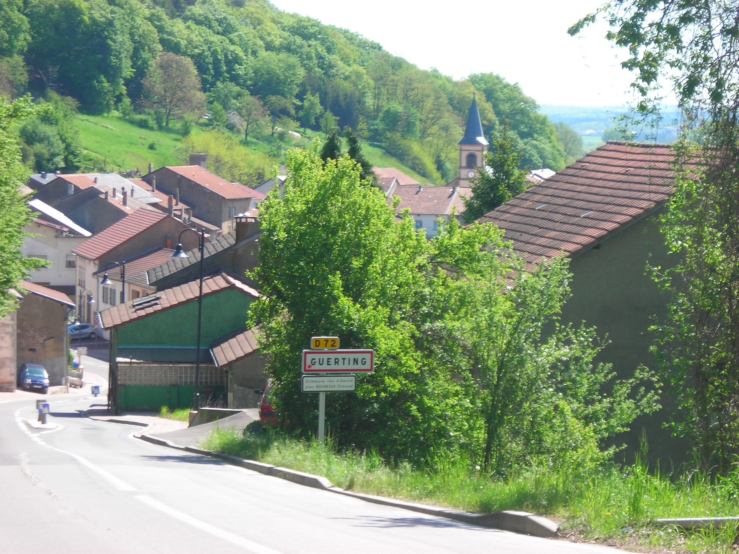 Guerting